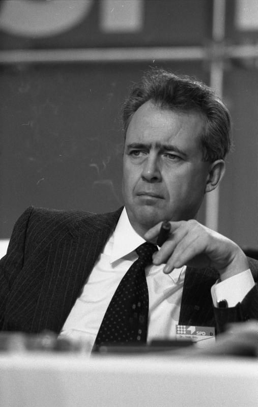 Außerordentlicher Parteitag der SPD im Messe-Kongreß-Zentrum in Köln zur Vorbereitung für die Europa-Parlament-Wahl 1979